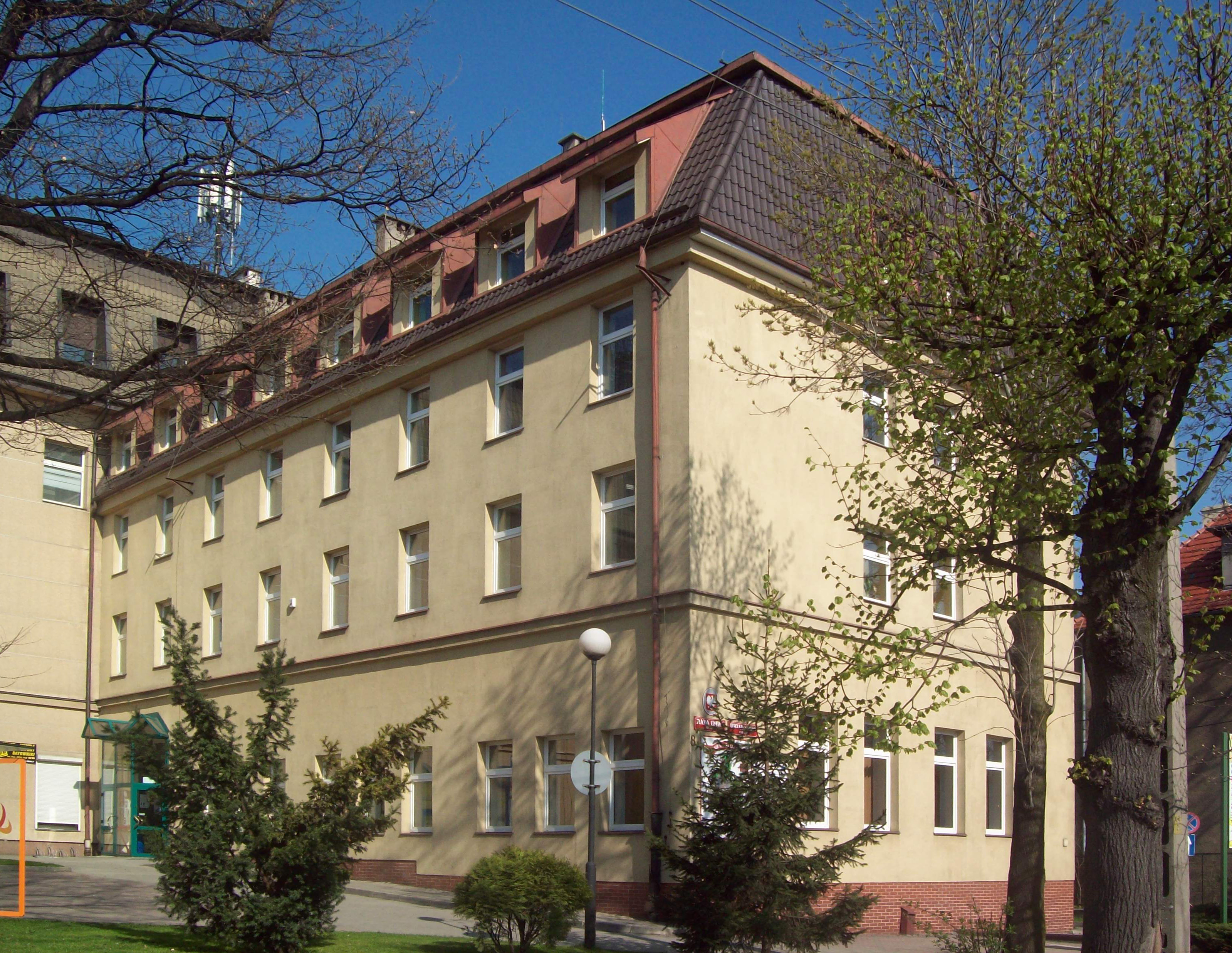 Urząd Gminy w Kłodzku